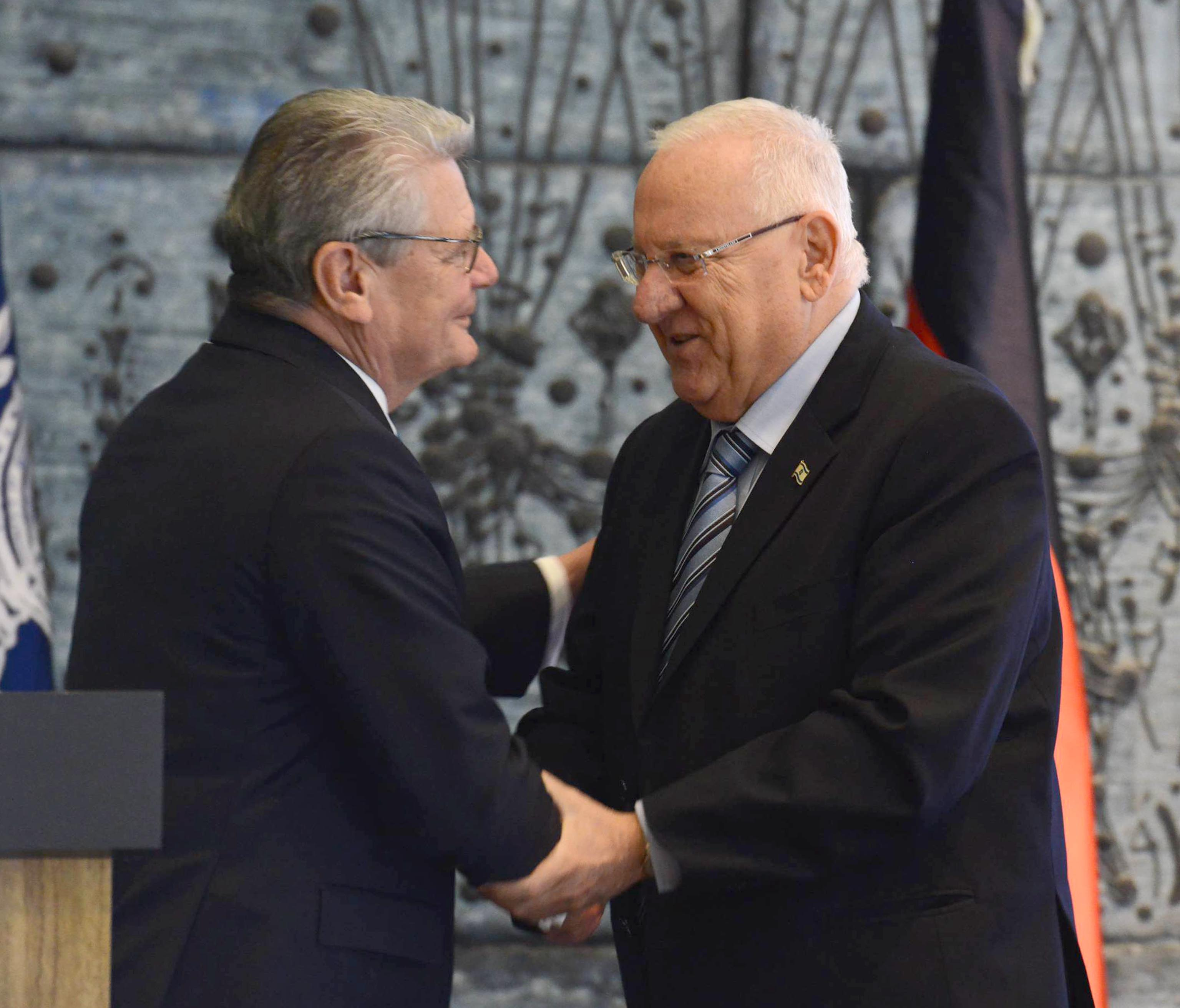 נשיא גרמניה יואכים גאוק, בעת ביקורו בישראל עם נשיא מדינת ישראל ראובן ריבלין